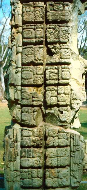 Maya inscriptie in steen, Copan, Honduras (eigen foto, 1980)